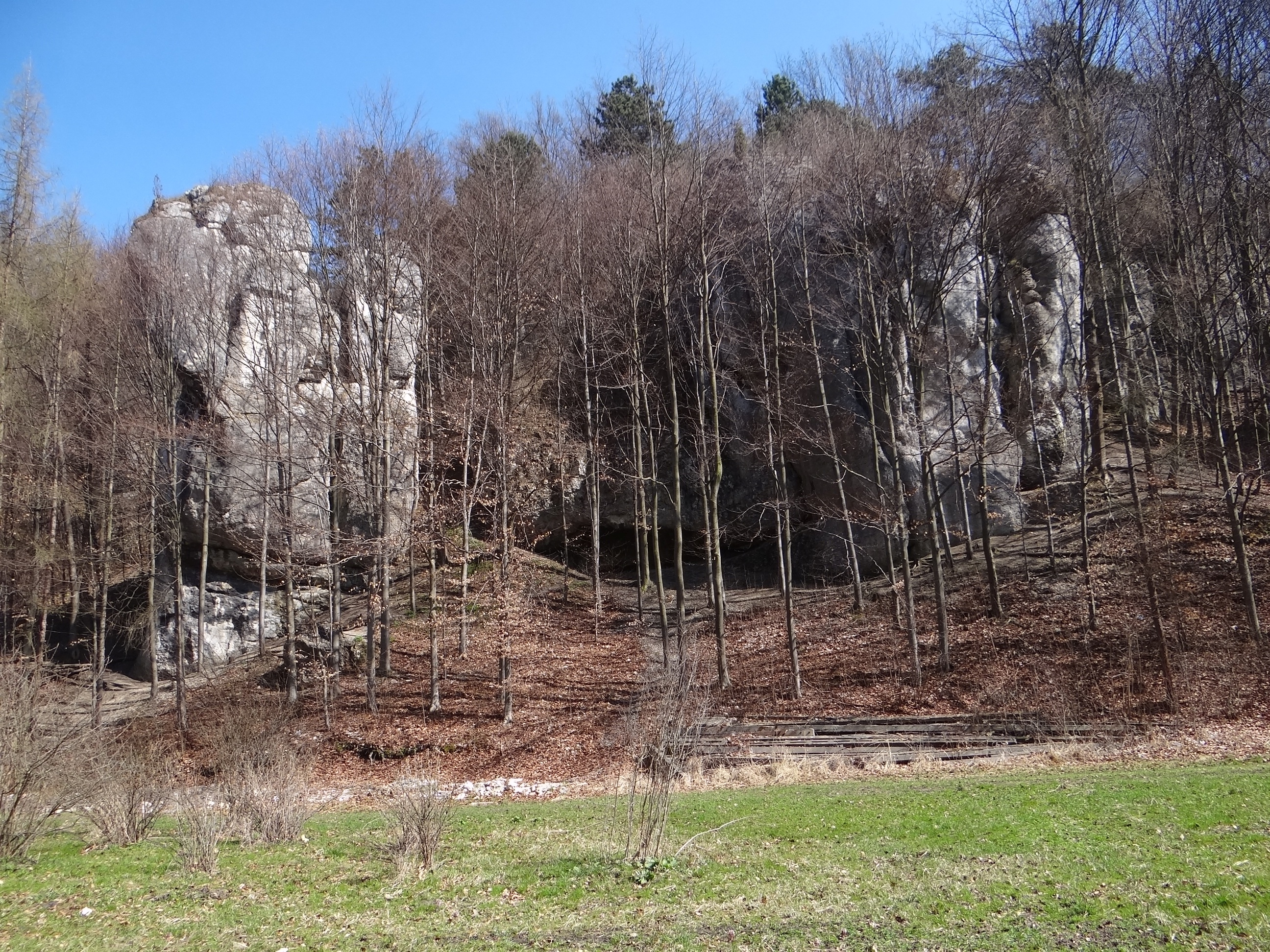 Dzika Baszta w Dolinie Brzoskwinki